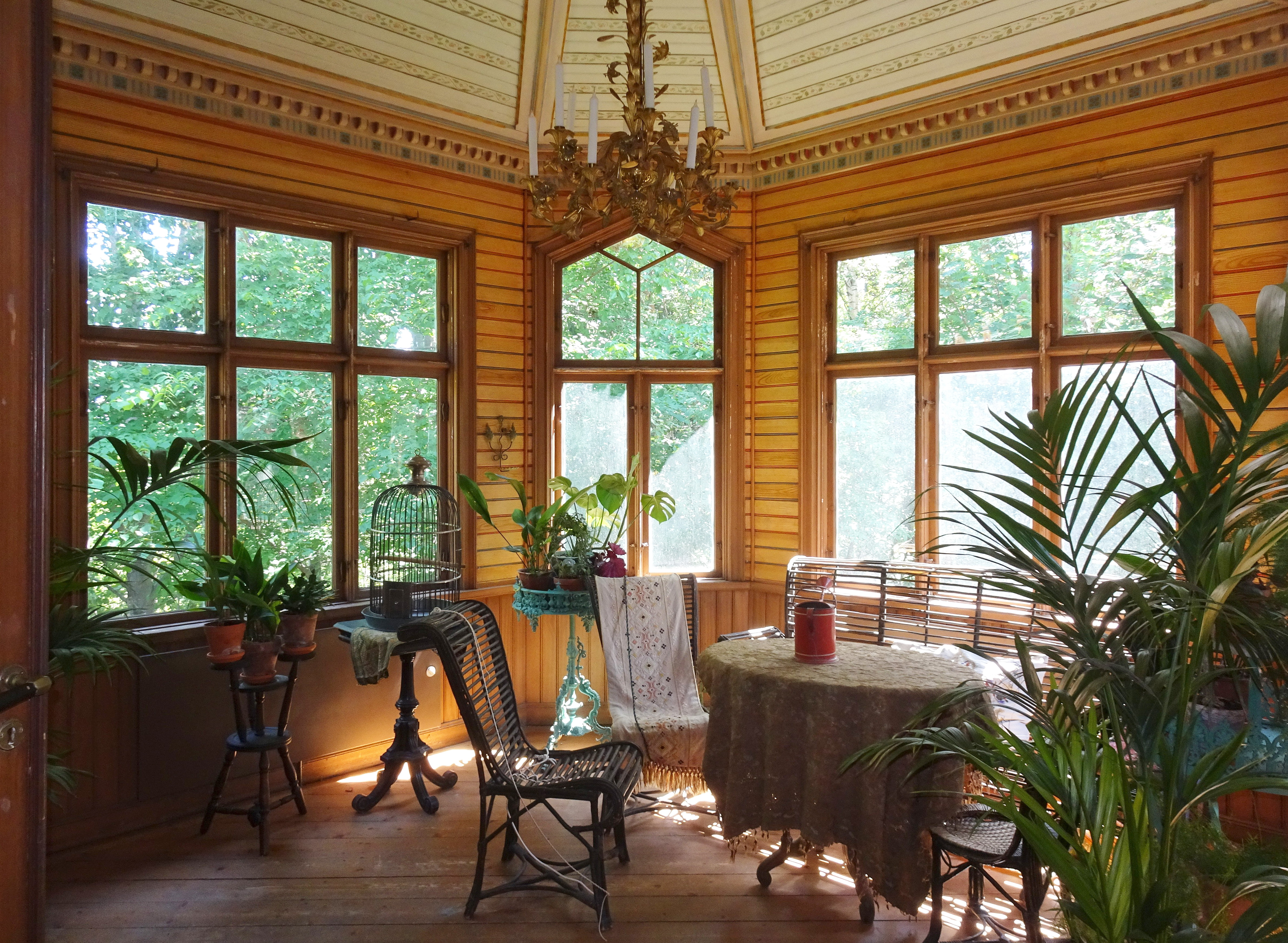 Holmbergska villan på Turekällberget. Huset uppfördes 1885 som sommarhus för byggmästaren Jöns Peter Holmberg från Stockholm efter ritningar av arkitekt Ernst Haegglund. 1966 revs villan för att ge plats åt Scania-Vabis personalbostäder. Matsalen och verandan bevarades och skänktes till Torekällbergets museum